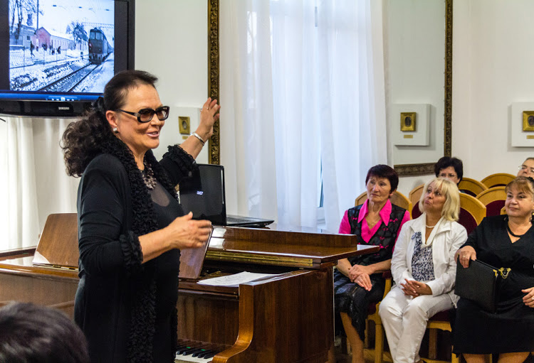 Наталія Безбах відкриває сезон Салону мистецтв 2013